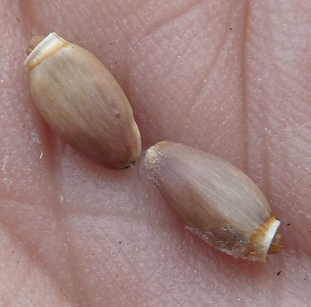 Silybum marianum (Cardo mariano) - Cipselas desprovistas de su vilano (muy caedizo) - Circa Estación de Contenedores de ADIF/RENFE de Embajadores-Abroñigal, Madrid (España).